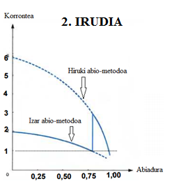 Korronte grafika